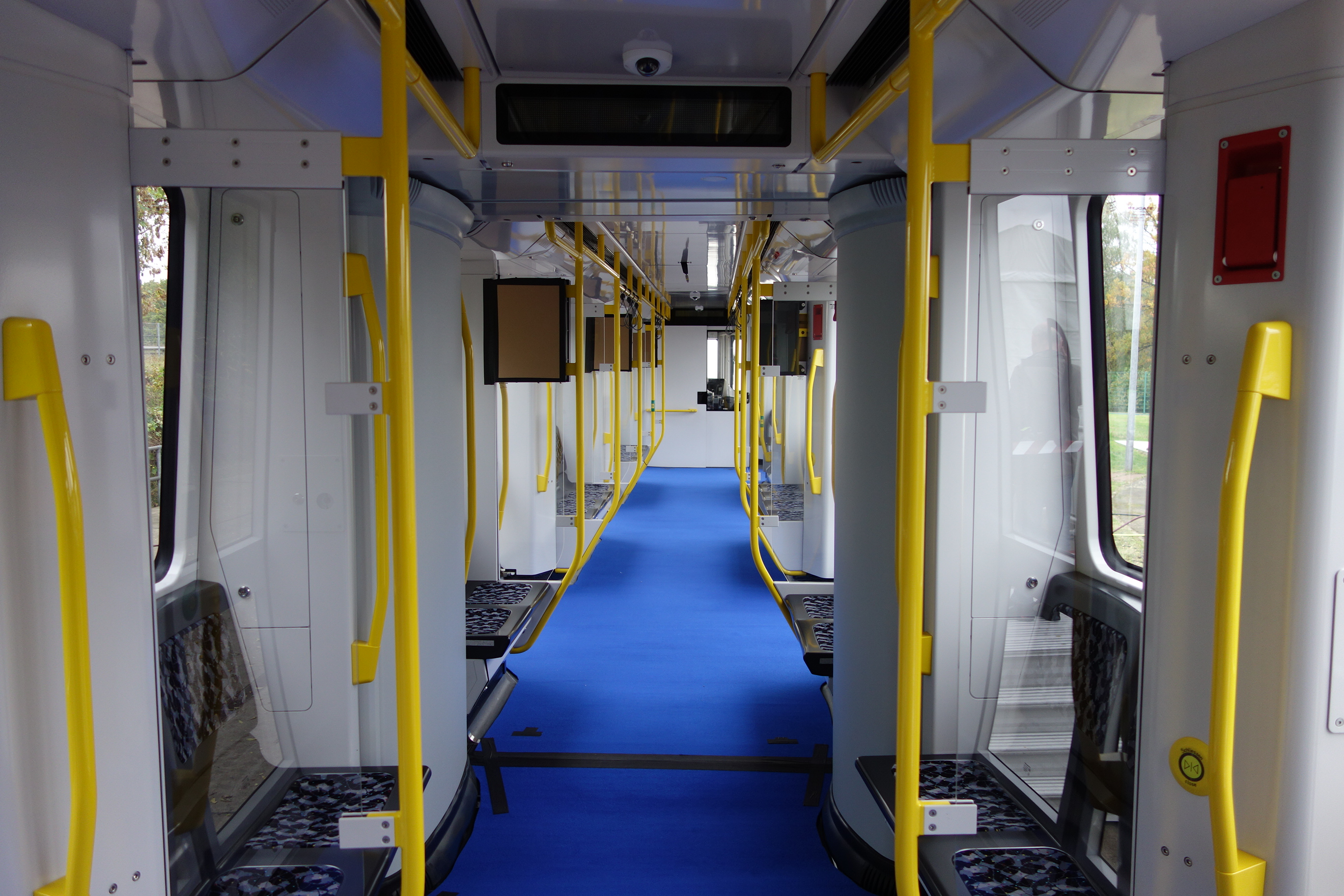 Fertigung eines U-Bahn-Zugs der Baureihe IK17 im Stadler Werk Pankow, Innenraum mit Schutz-Teppich